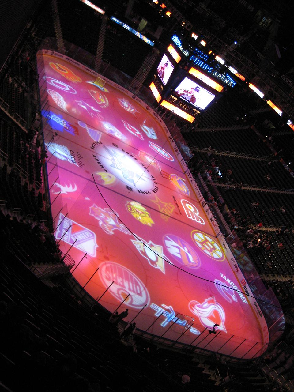 SD800-05440